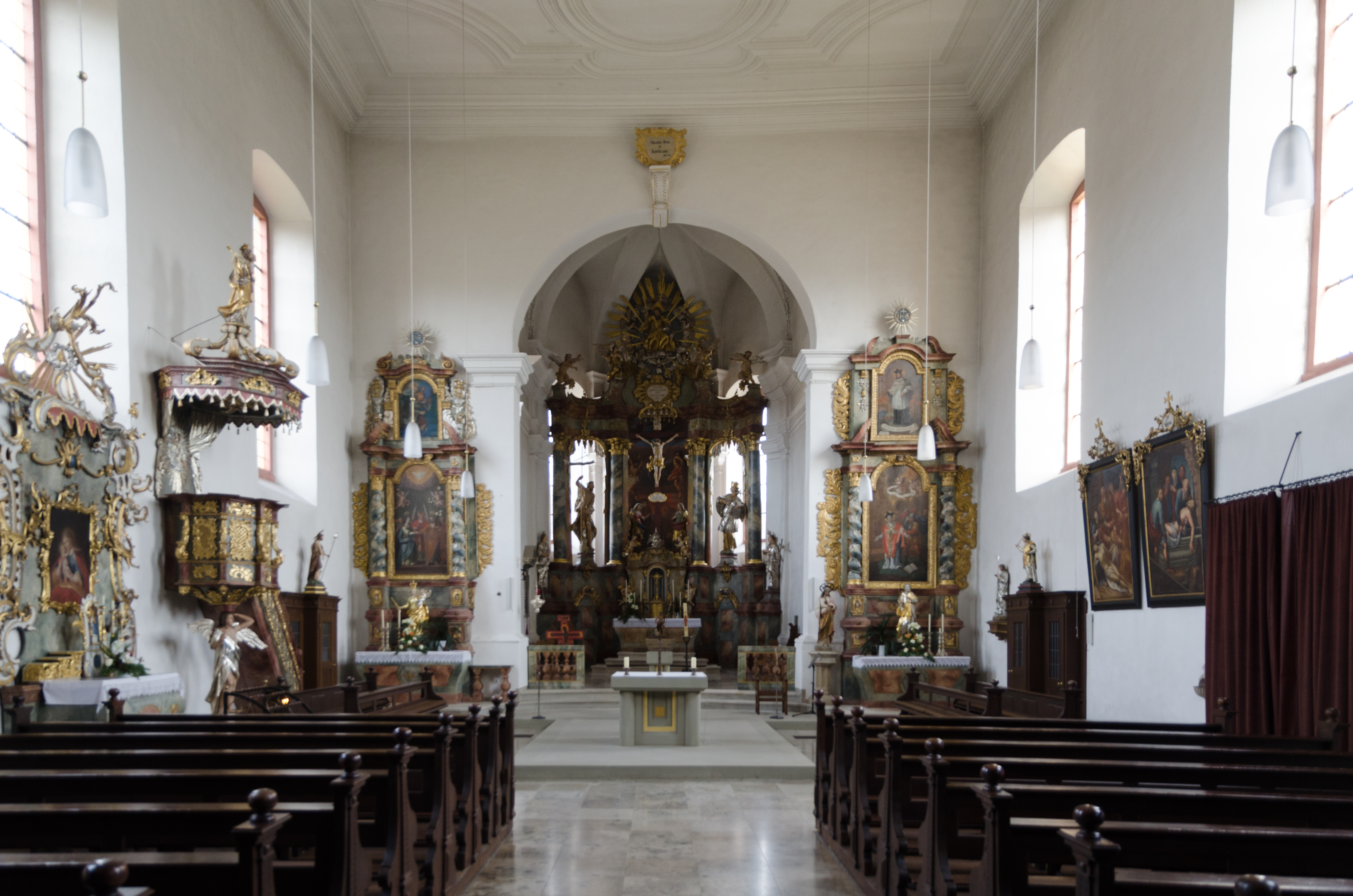 Bad Königshofen im Grabfeld, Untereßfeld, St. Johann Baptist und St. Aquilin